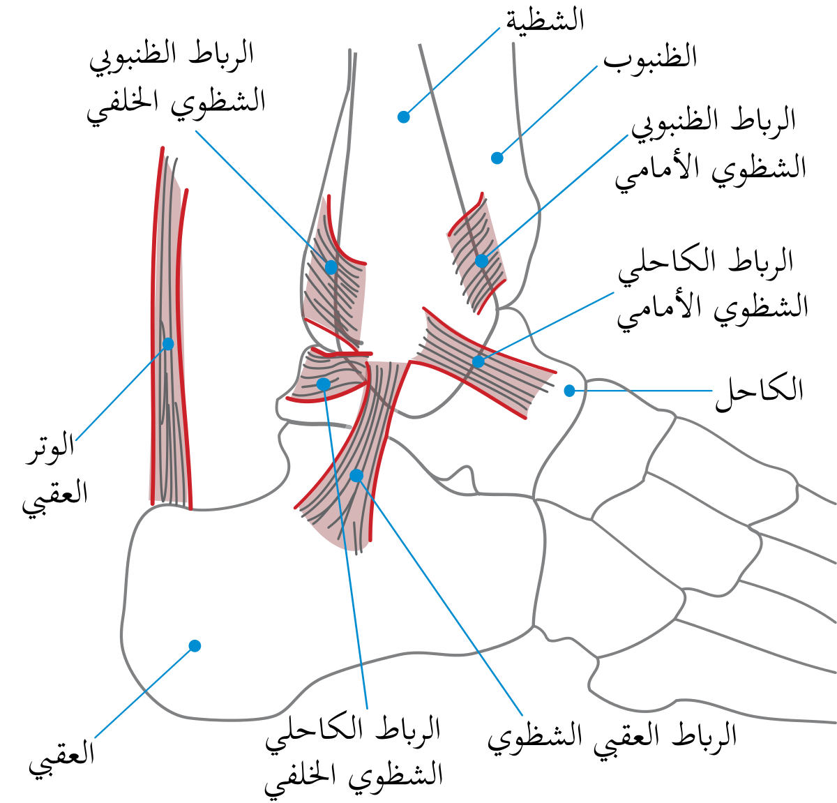 صورة تظهر اجزاء الكاحل